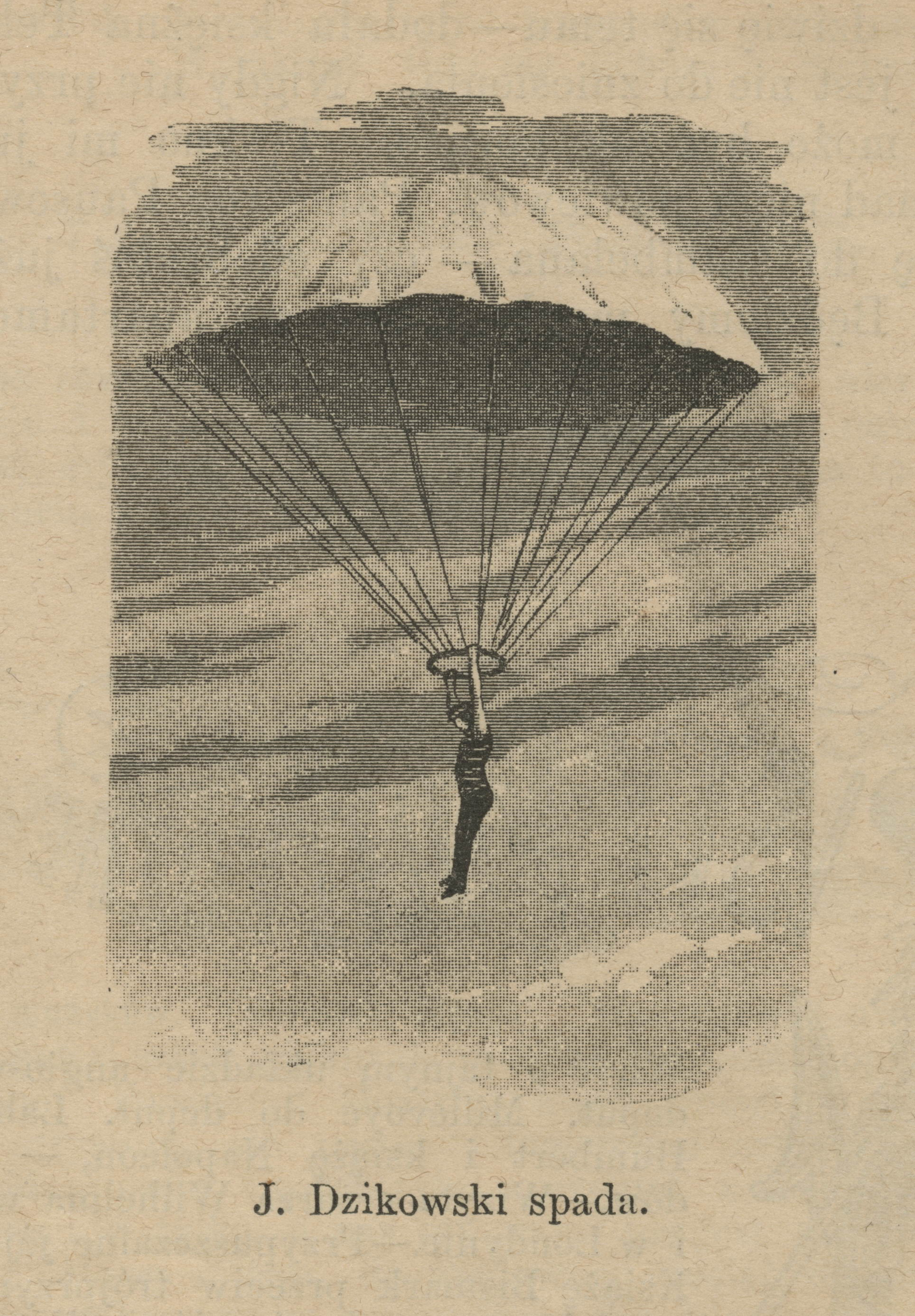 J. Dzikowski spada. Skok ze spadochronem